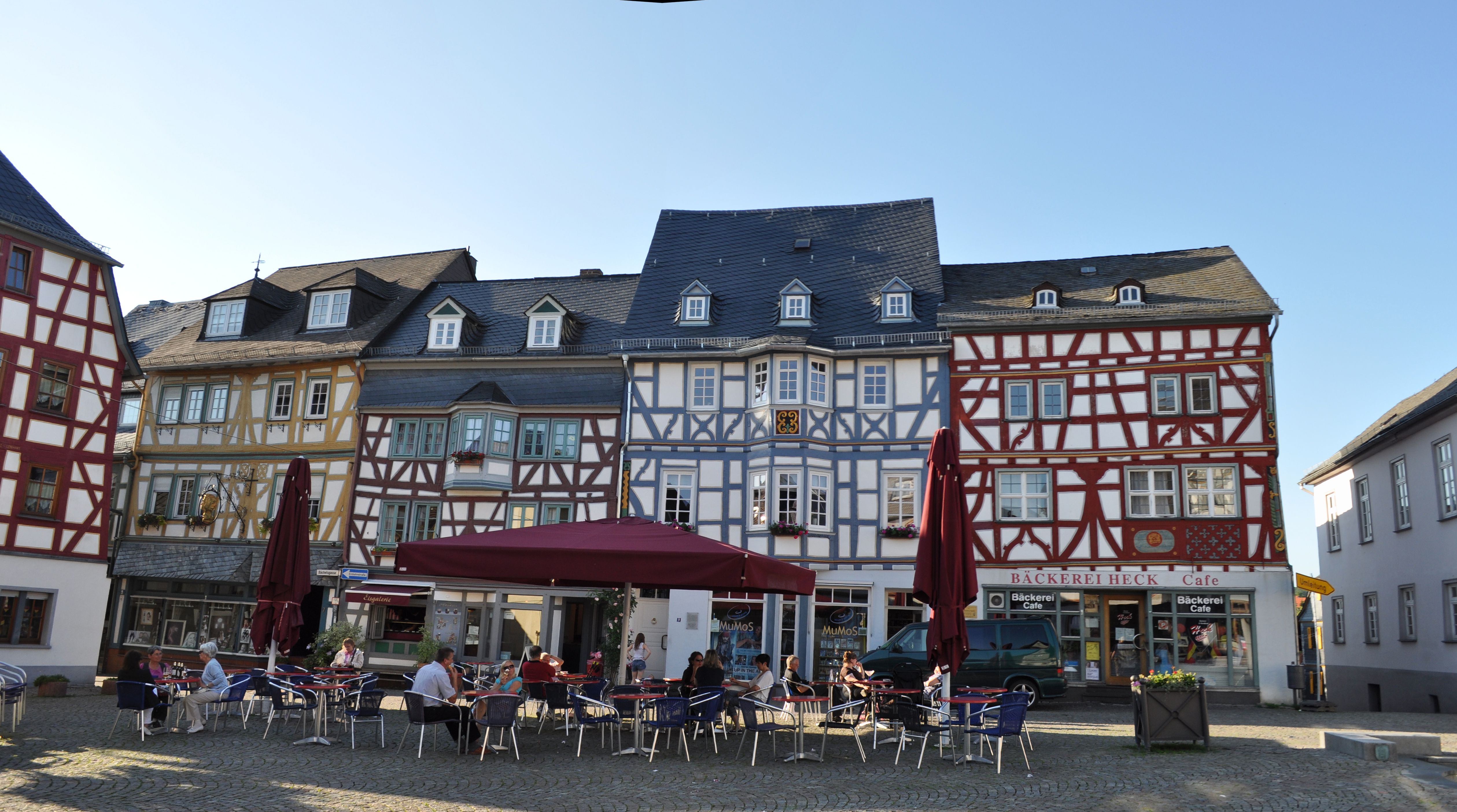 Bad Camberg, Marktplatz 7-11